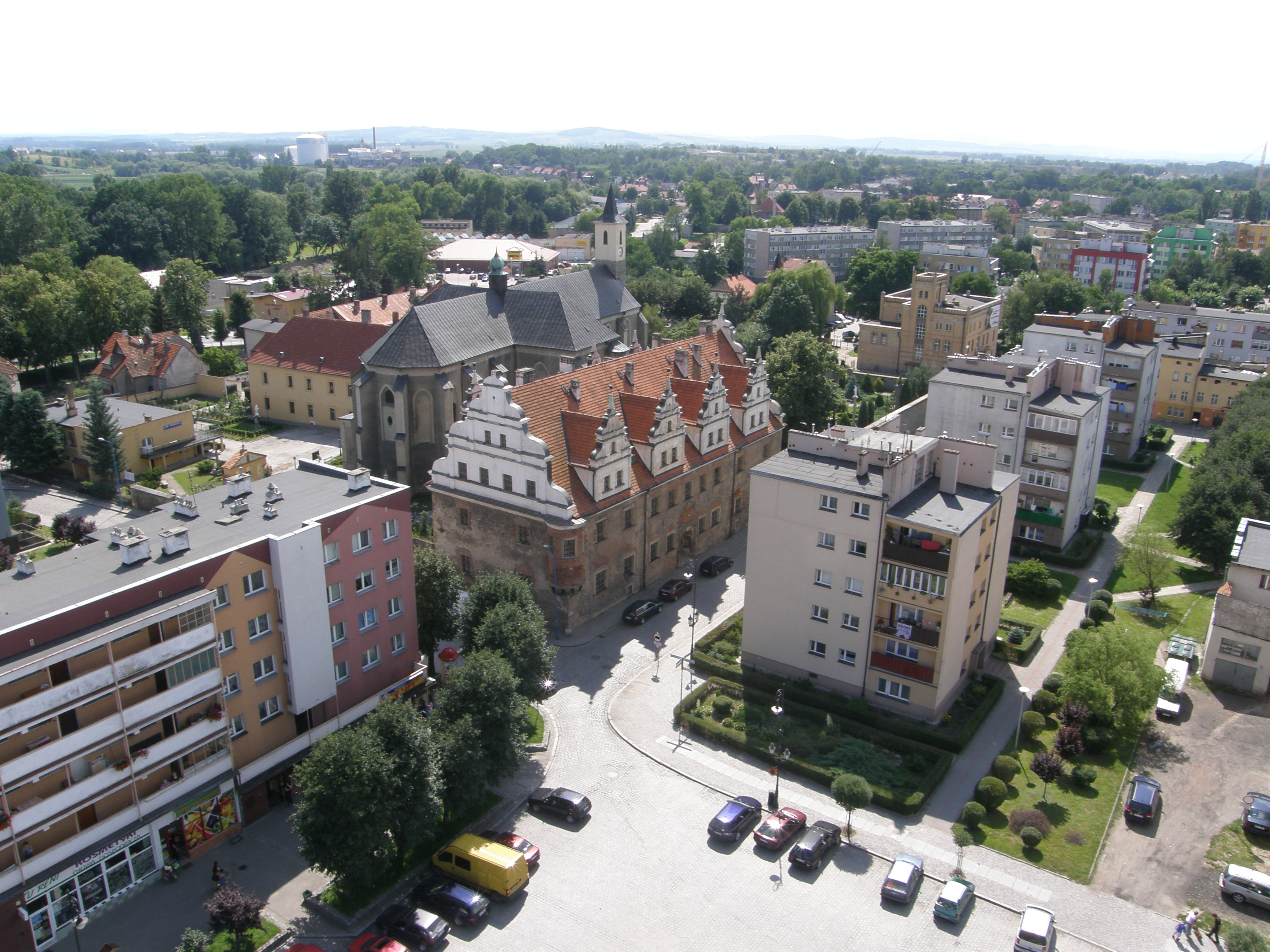 Zdjęcie wykonane z wieży ratusza w kierunku zachodniej części miasta, obrazujące wzdłuż ulicę T. Kościuszki od Rynku do ronda.